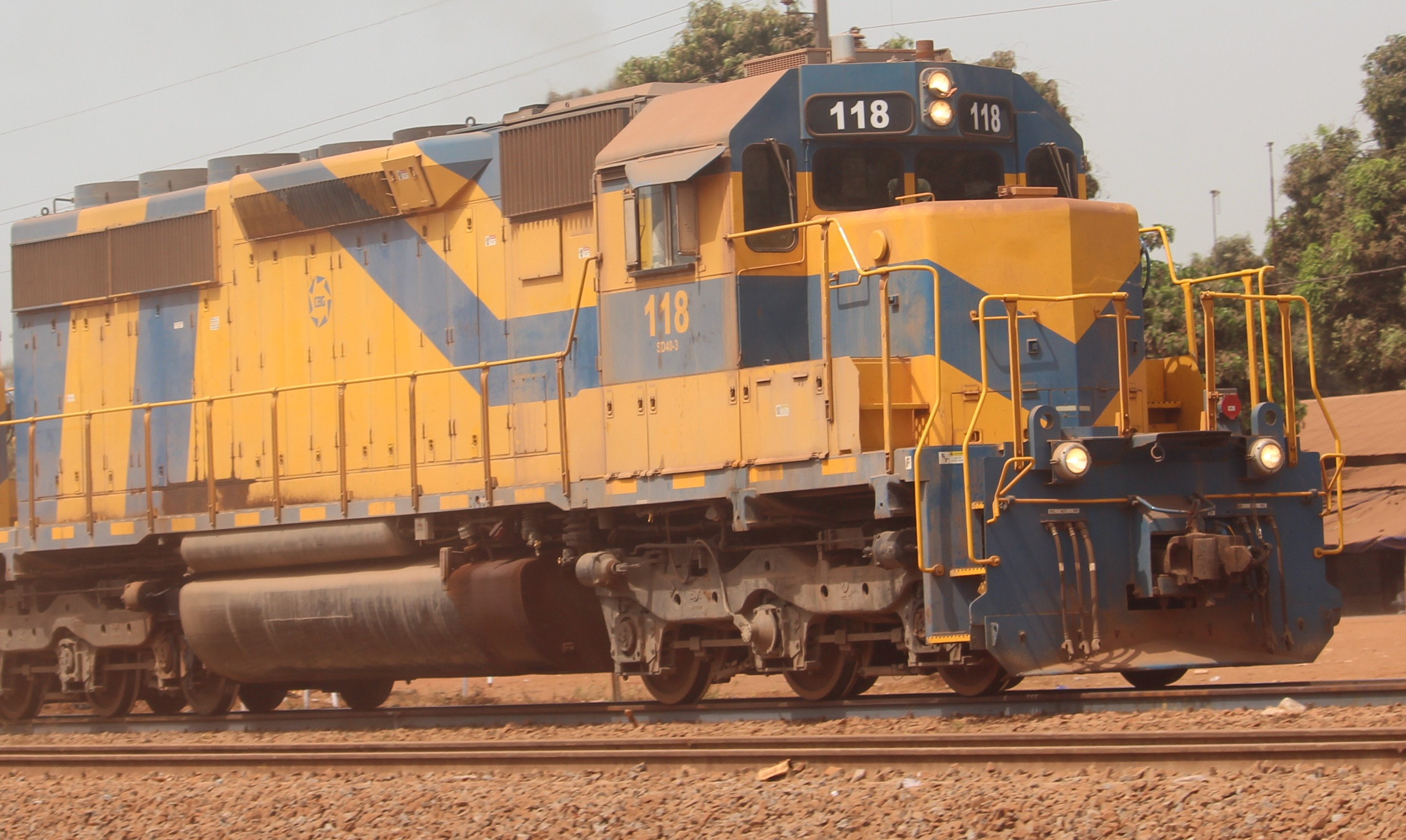 Locomotive de la CBG a Kamsar This is an image with the theme "Africa on the Move or Transport" from: Guinea